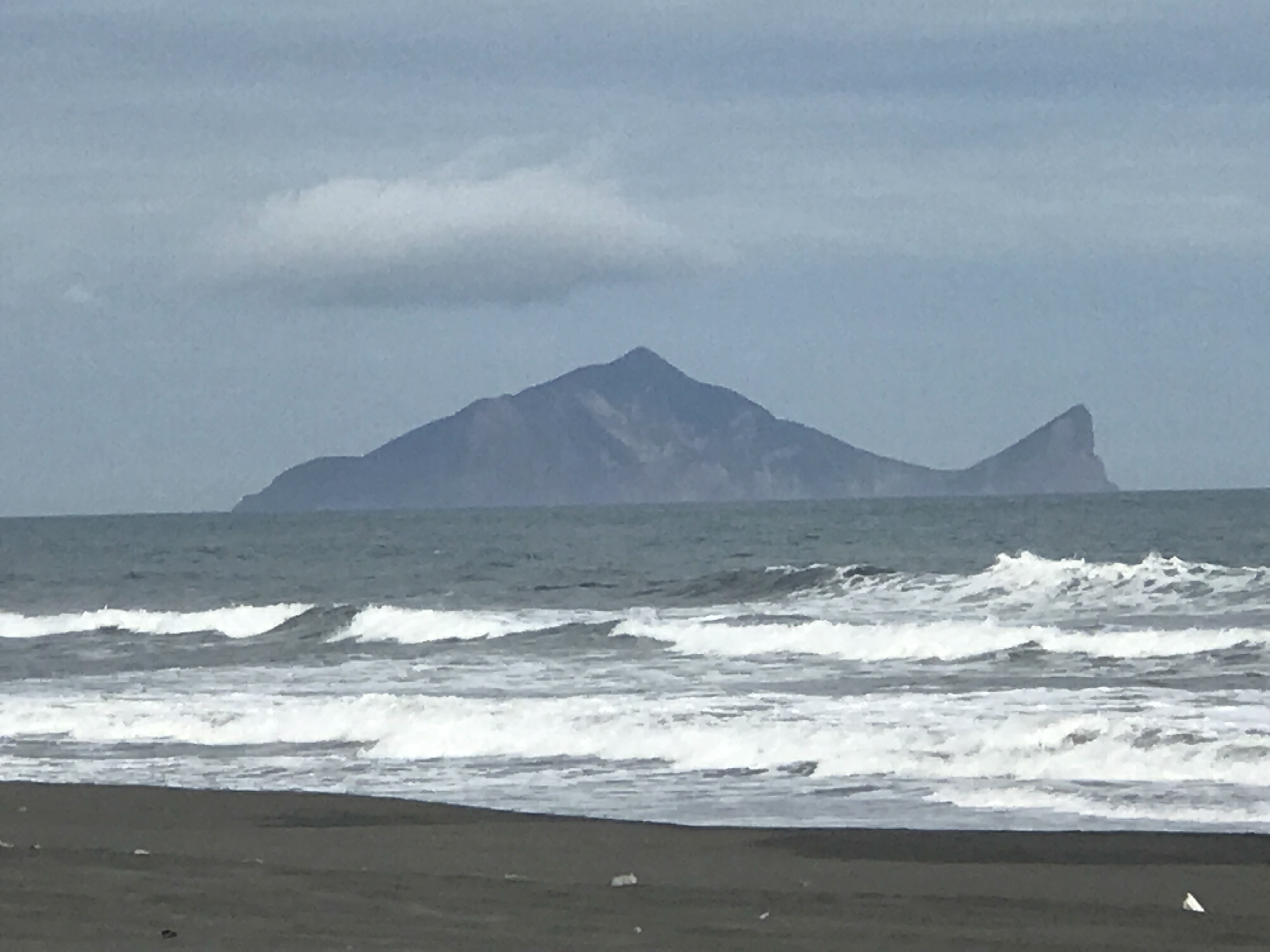 台灣的東北小外島，龜山島猶如一隻游趴在海上的大巨龜！